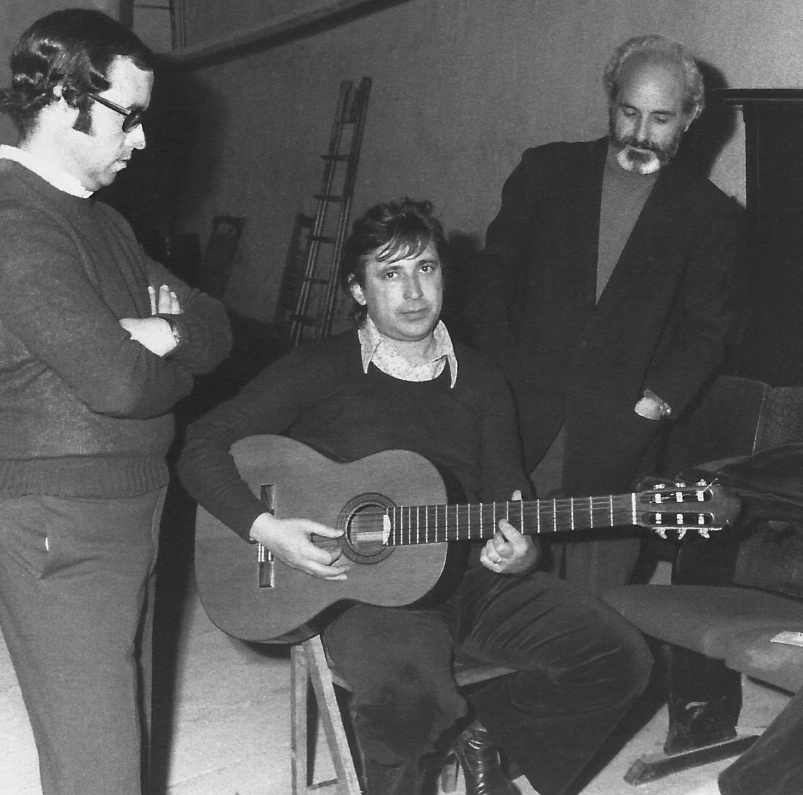 Ramon Pelegero i Sanchis, conegut pel nom artístic de Raimon, (Xàtiva, 2 de desembre de 1940) és un cantautor valencià. Fotografia d'Ismael Latorre Mendoza, del 20-05-1973. Escenari del Teatre Moderno d'Alginet. D'esquerra a dreta: Vicent Espí, Raimon i el pintor José Espert Climent. Imatge editada en: Levante-EMV La Ribera, imatges de l'Arxiu 17-06-2017